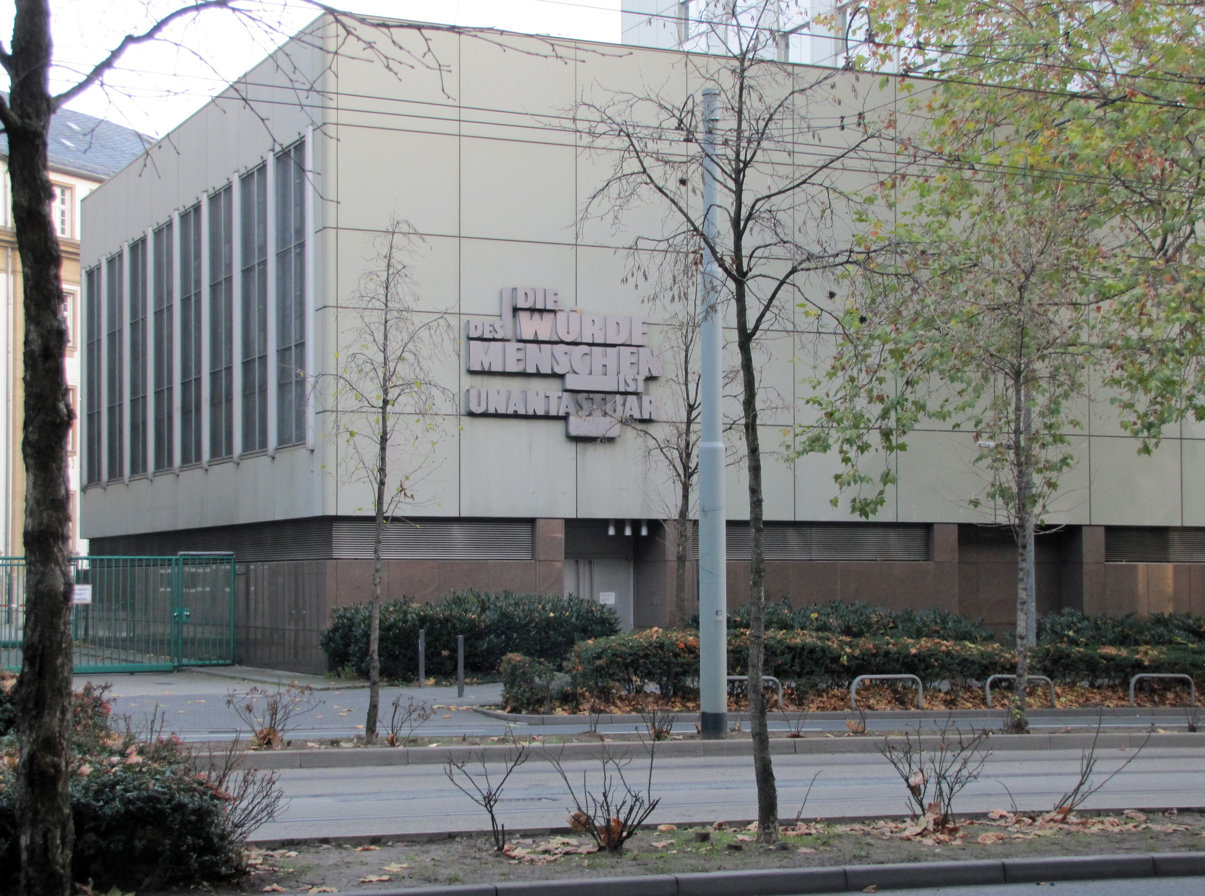 Art. 1, Satz 1, des Grundgesetzes der Bundesrepublik Deutschland, am Gebäude C des Landgerichtes, an der Konrad-Adenauer-Strasse in Ffm.